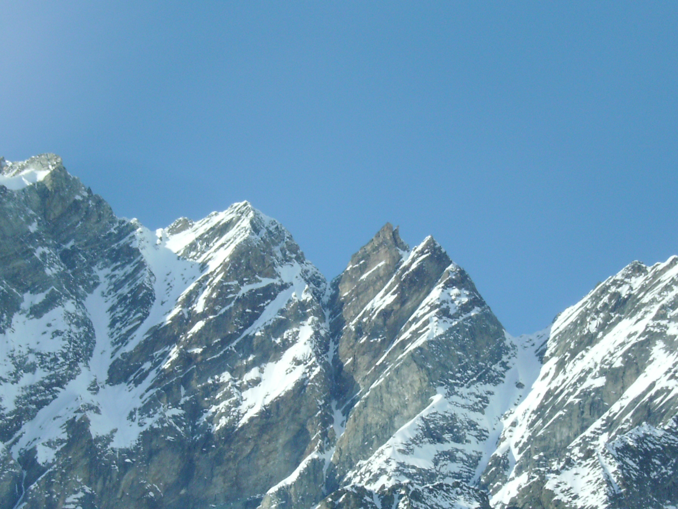 P.ta Bianca + P.ta Carrel + P.ta Maquignaz, Valtournenche (Valle d'Aosta)